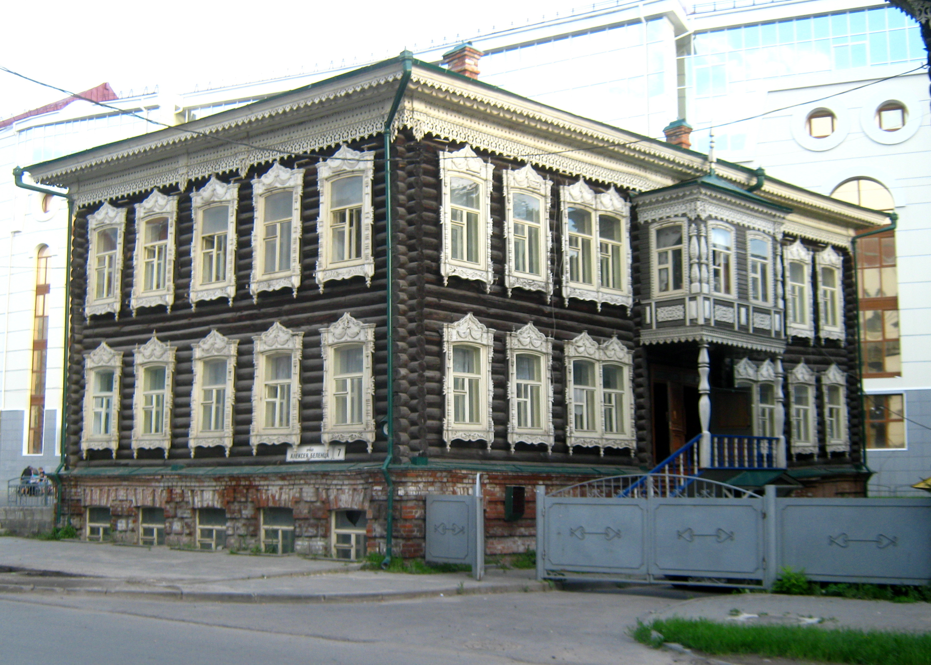 Беленца 7, Томск